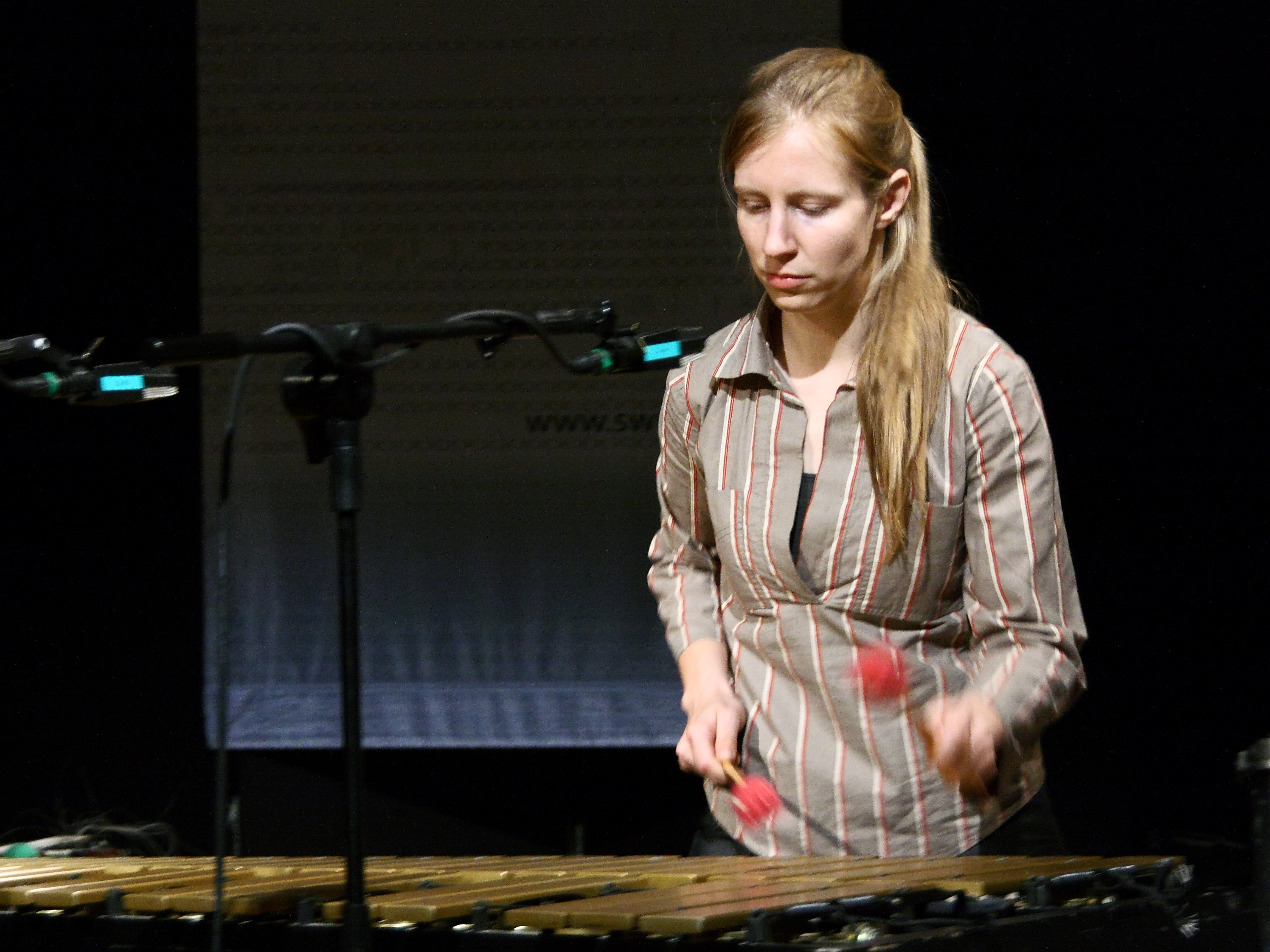 Die belgische Vibraphonistin Els Vandeweyer im NOWJazz-Konzert des SWR 2, Club W71 und Stadt Niederstetten mit der Gruppe QUAT im KULT, Niederstetten 2013.